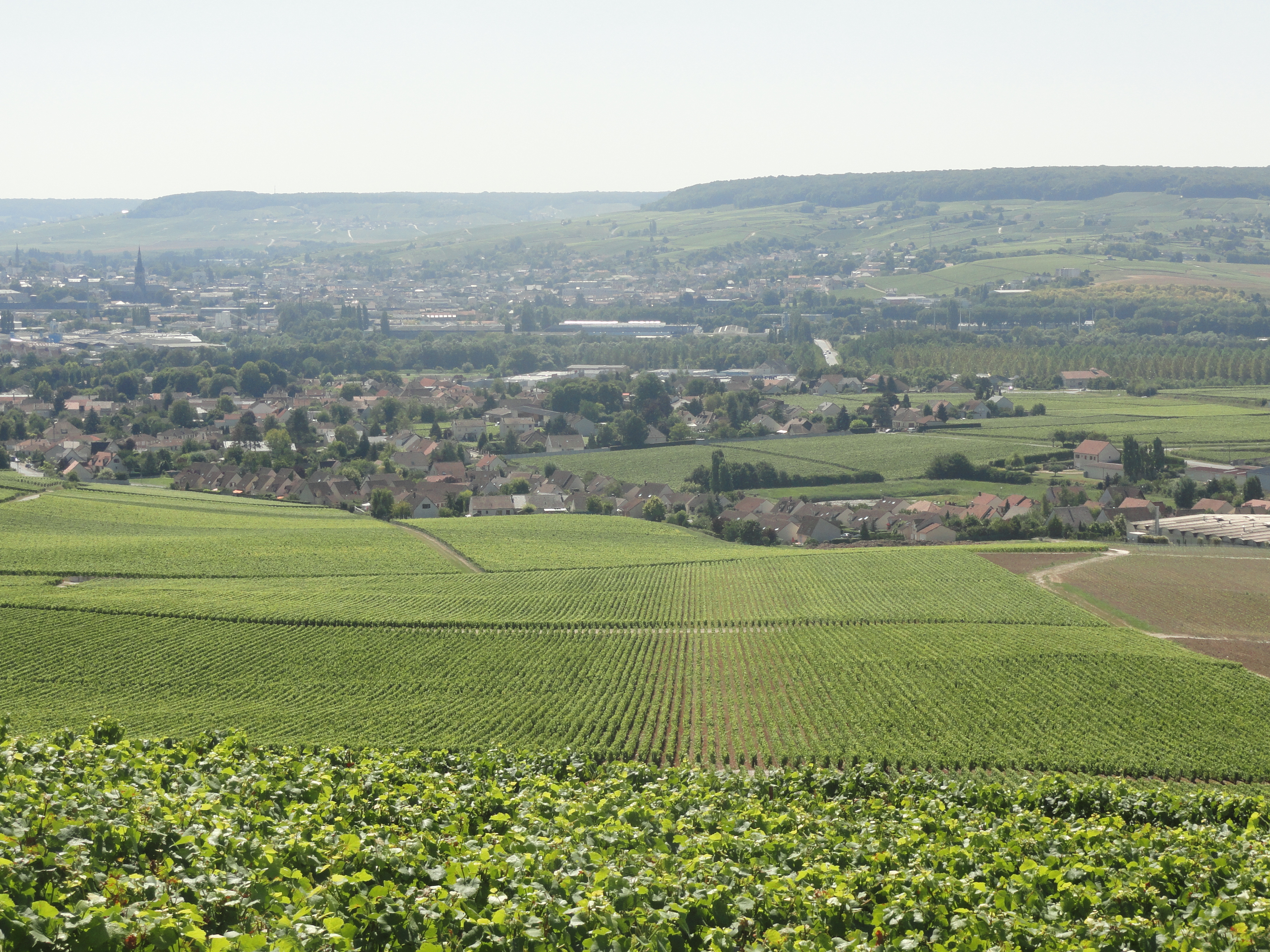 Vue de de Dizy (Marne) depuis le vignoble qui surplombe le village avec au fond la ville d’Épernay.